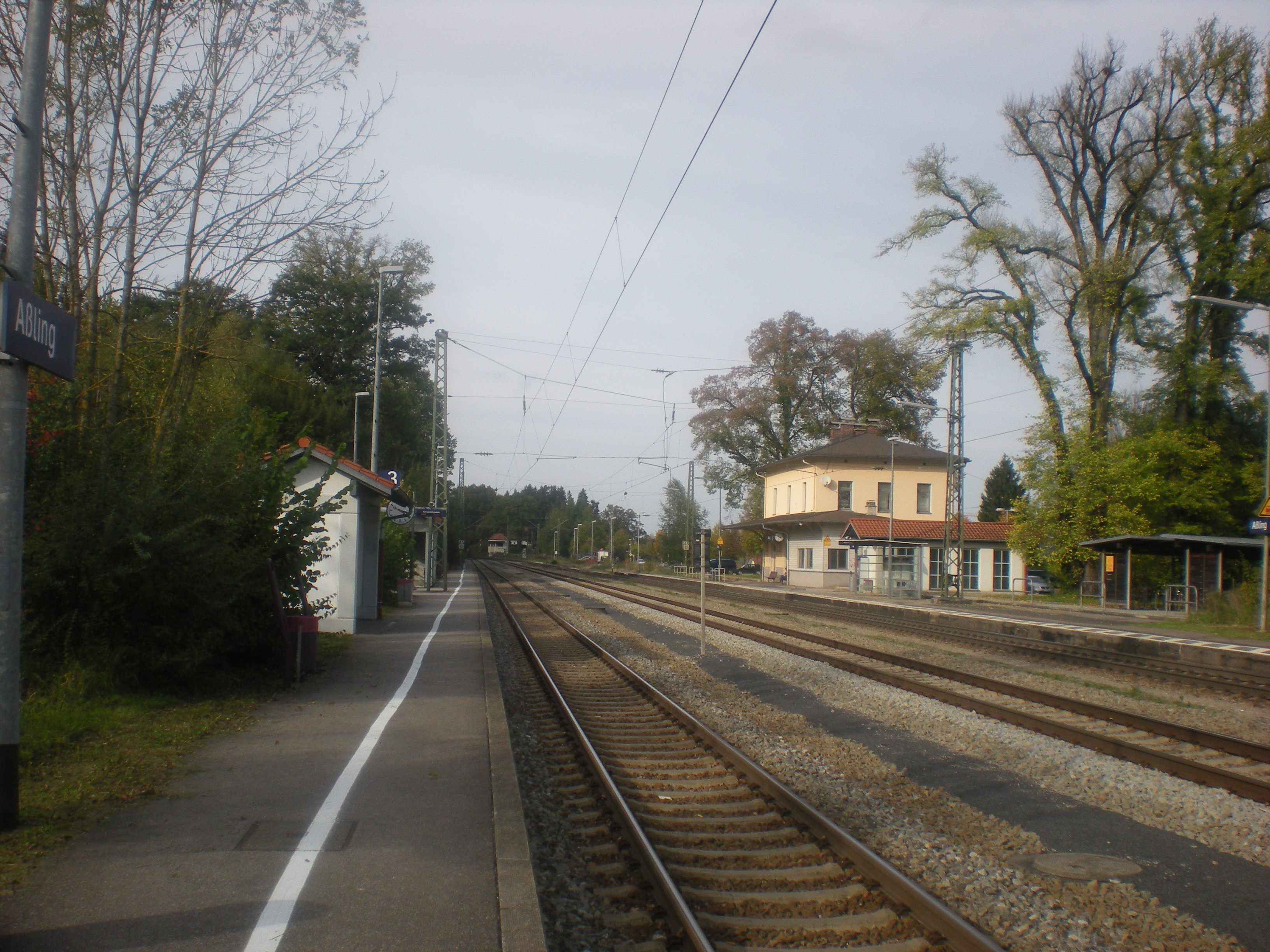 Seitenbahnsteige und Gleisanlagen des Bahnhofs Aßling (Oberbay)